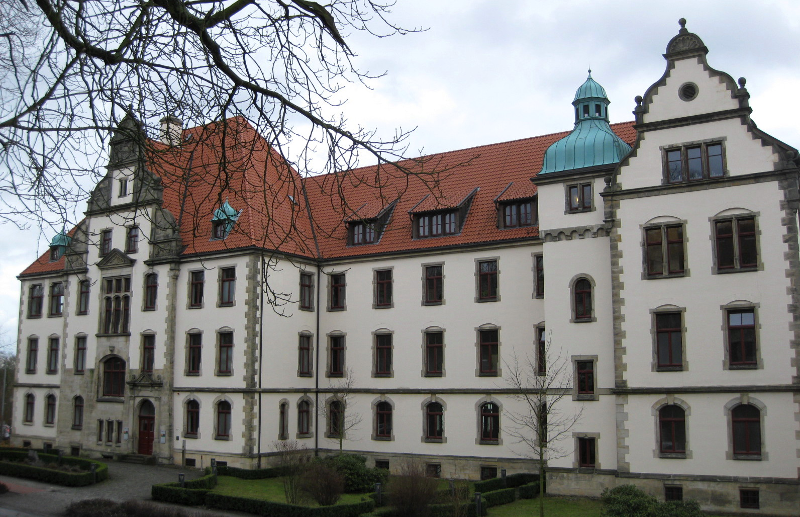 KME Forum der KM Europa Metal in Osnabrück, Knollstraße. Ehemalige Hebammenlehranstalt.